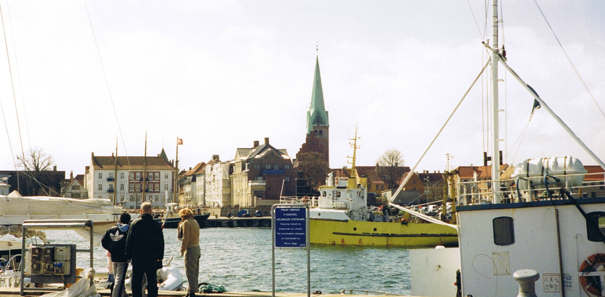 Porto em Helsingor, na Dinamarca. Harbor in Elsinore, Denmark.